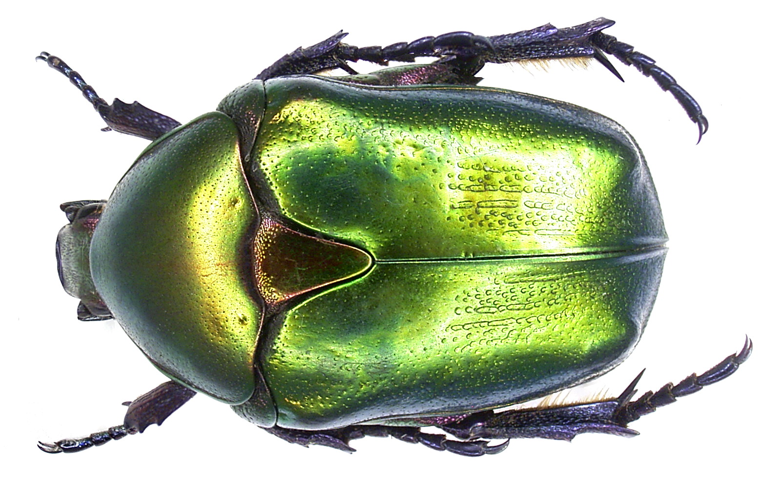 Familie: Scarabaeidae Grösse: 17-23,5 mm Fundort: Türkei, Prov. Antalya, Köprülü leg. A.Skale, 2004; det. Rößner Foto: U.Schmidt, 2007